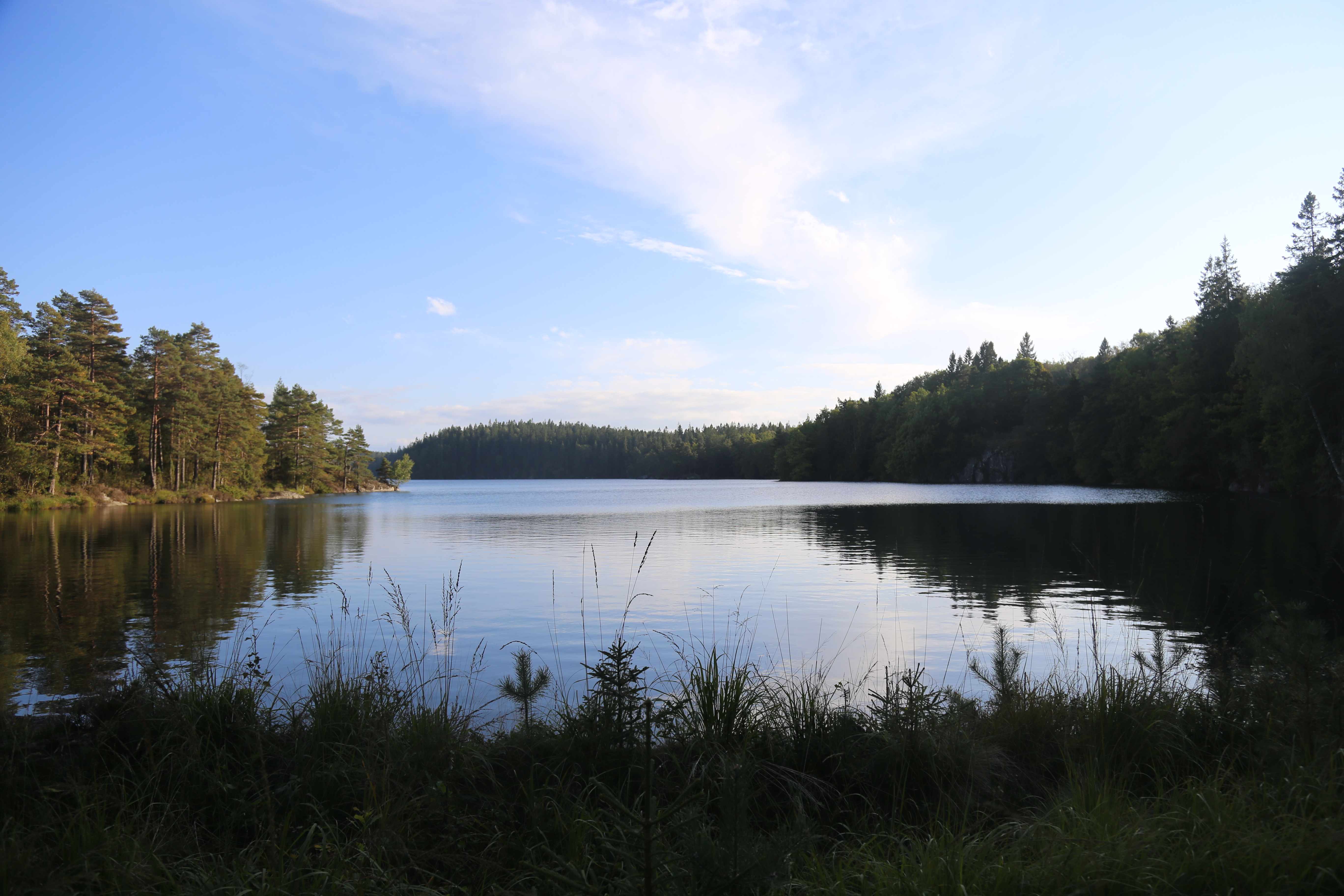 Vy från dammen i nordvästra Torrgårdsvatten i Lilla Edets kommun.